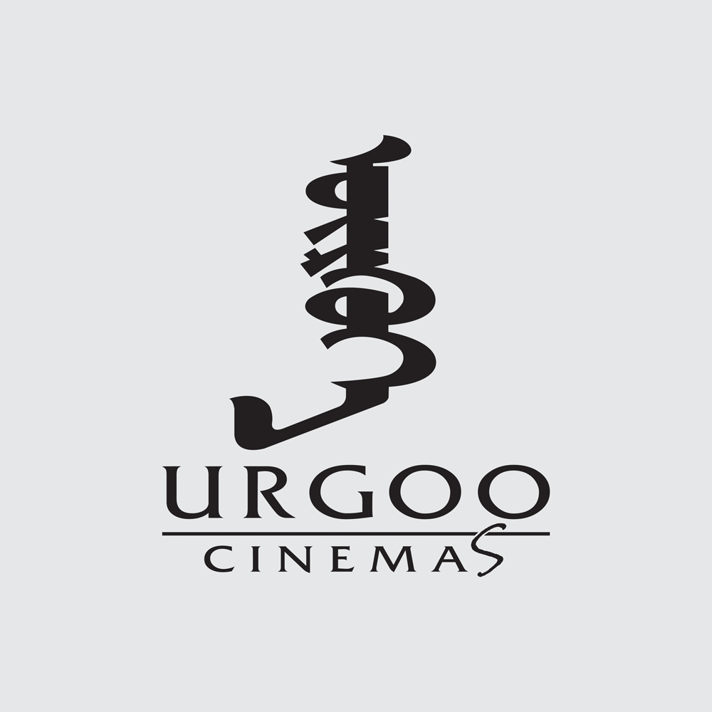 Монгол: Өргөө кино театрын лого